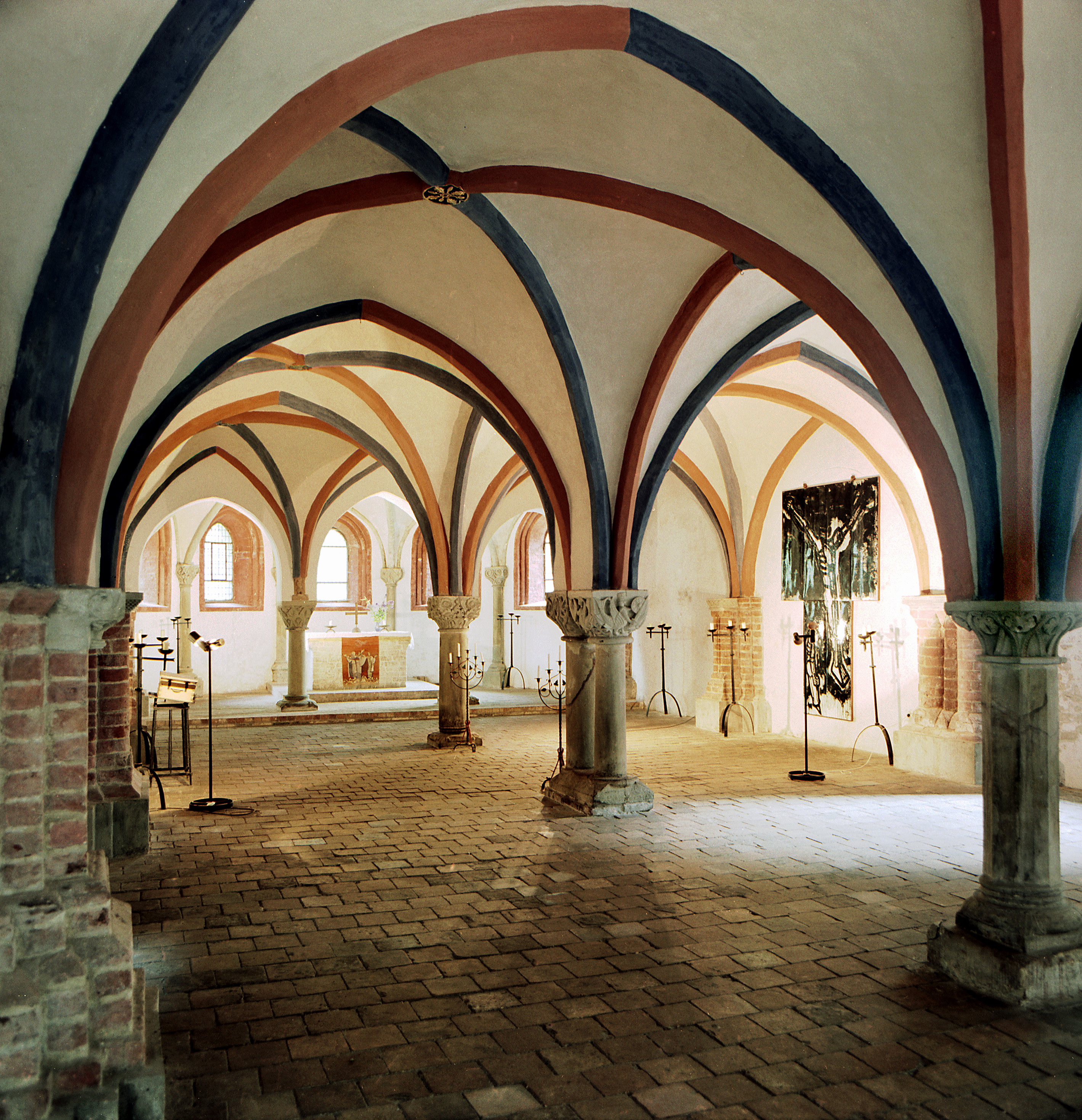 20.07.1986 DDR-1800 [14776] Brandenburg, Burghof 7 (GMP: 52.415332,12.567383): Dom St. Peter und Paul. 1165 Grundsteinlegung des romanischen Doms. 14./15. Jh. Umbau zur gotischen Basilika. Krypta, Bereits im 12. Jh. angelegt, kunstvolle Kapitelle aus Sandstein, um 1220/30, dient heute als Gedenkstätte für die Opfer der evangelischen Kirche in der Zeit des Faschismus. [R19860720A11.TIF]19860720180NR.JPG(c)Blobelt